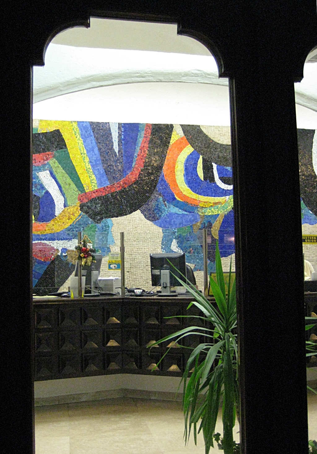 Unutrašnjost pošte u Rijeci na Korzu, rad Ede MurtićaMosaic by Edo Murtić (1921 -2005), 2nd half of 20th century work